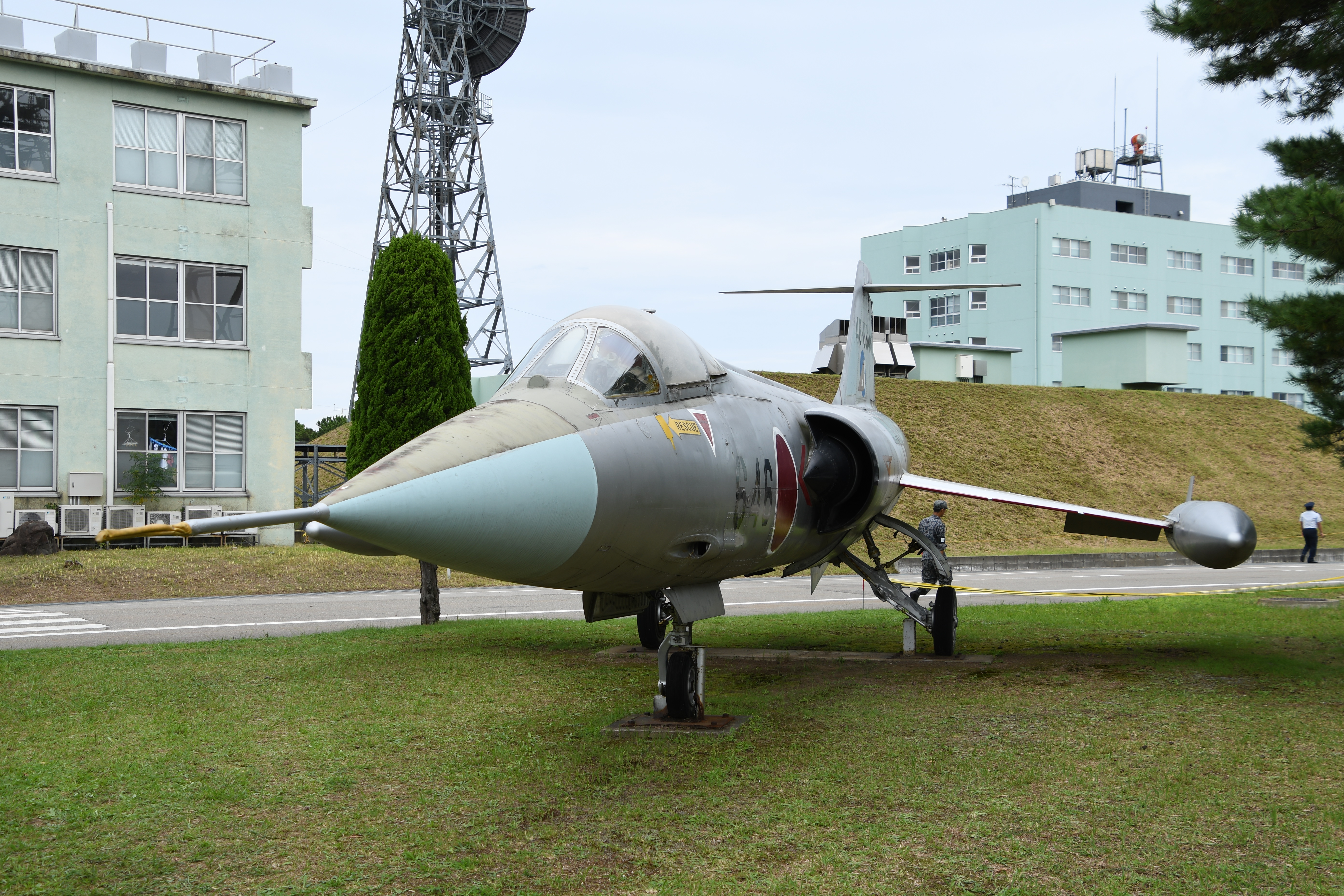 航空自衛隊 F-104J戦闘機（46-8646号機） 左前面。2018年9月17日 小松基地にて。